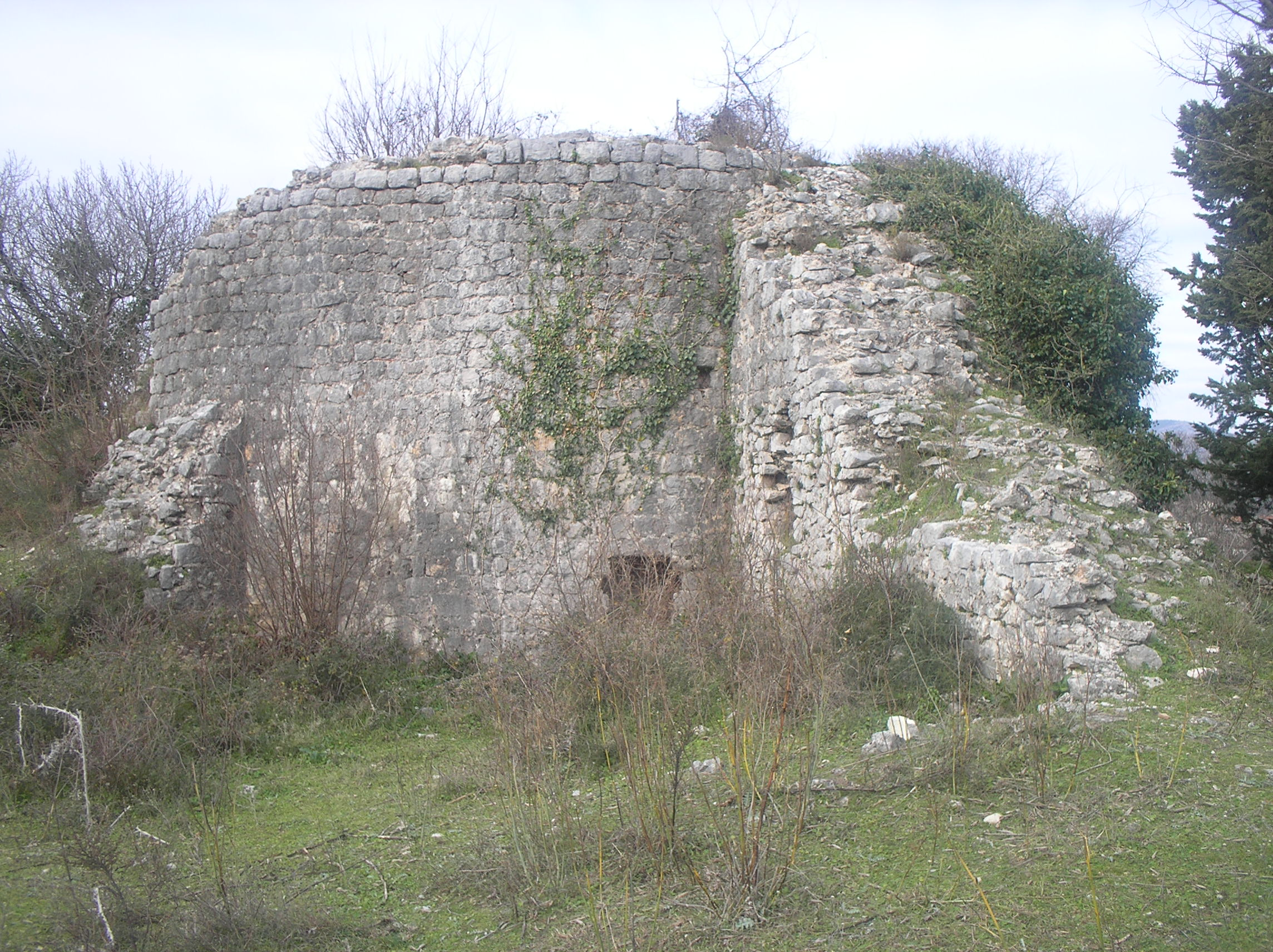 Stari Grad